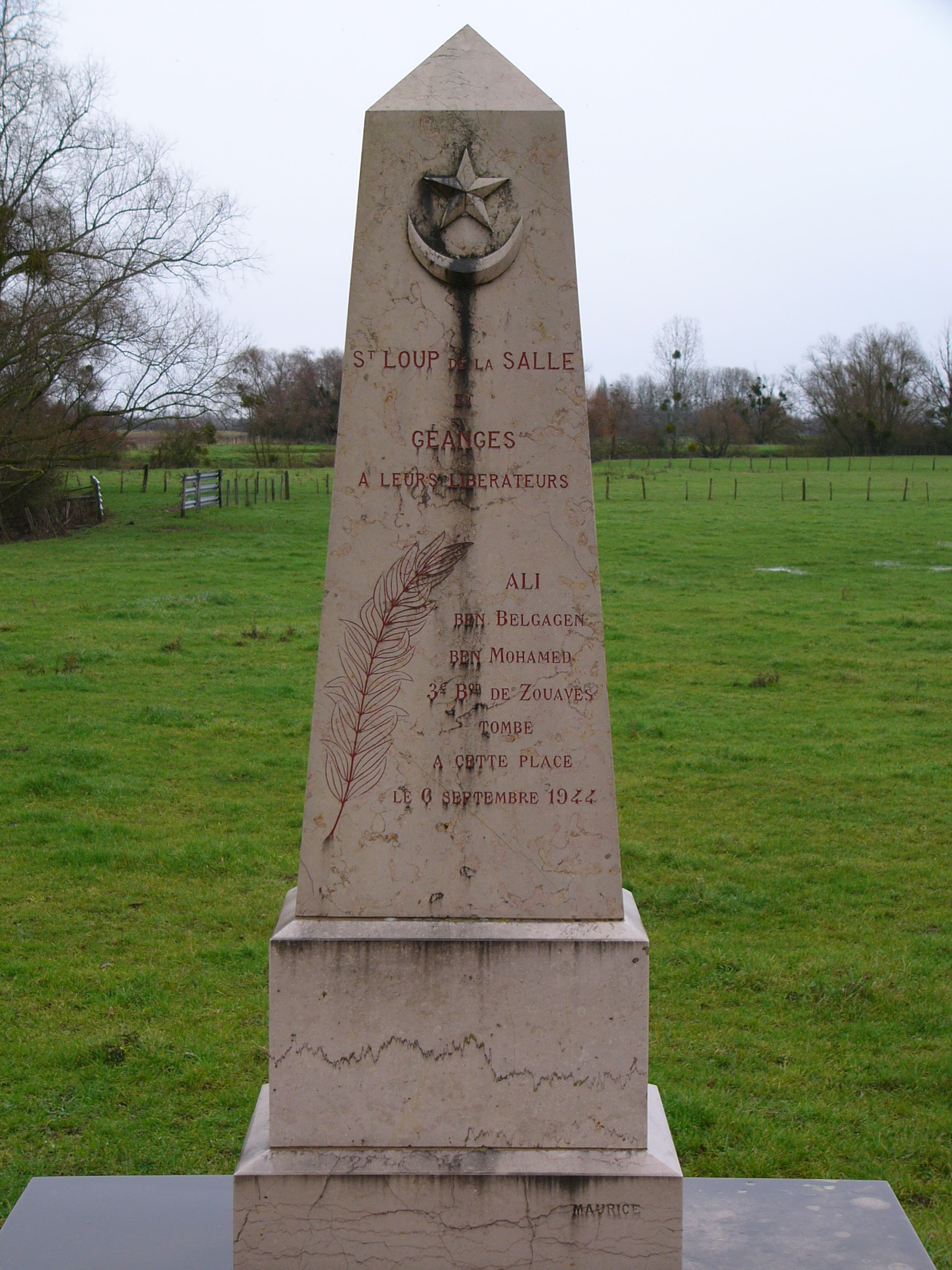 Monument en hommage à Ali Ben-Belgadem Ben-Mohamed, du 3e régiment de Zouaves, tombé à cette place le 3 septembre 1944